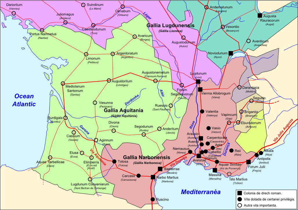 Organizacion administrativa d'Occitània entre lei sègles I e III ap. JC.